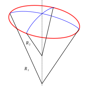 explication de la courbure d'une surface